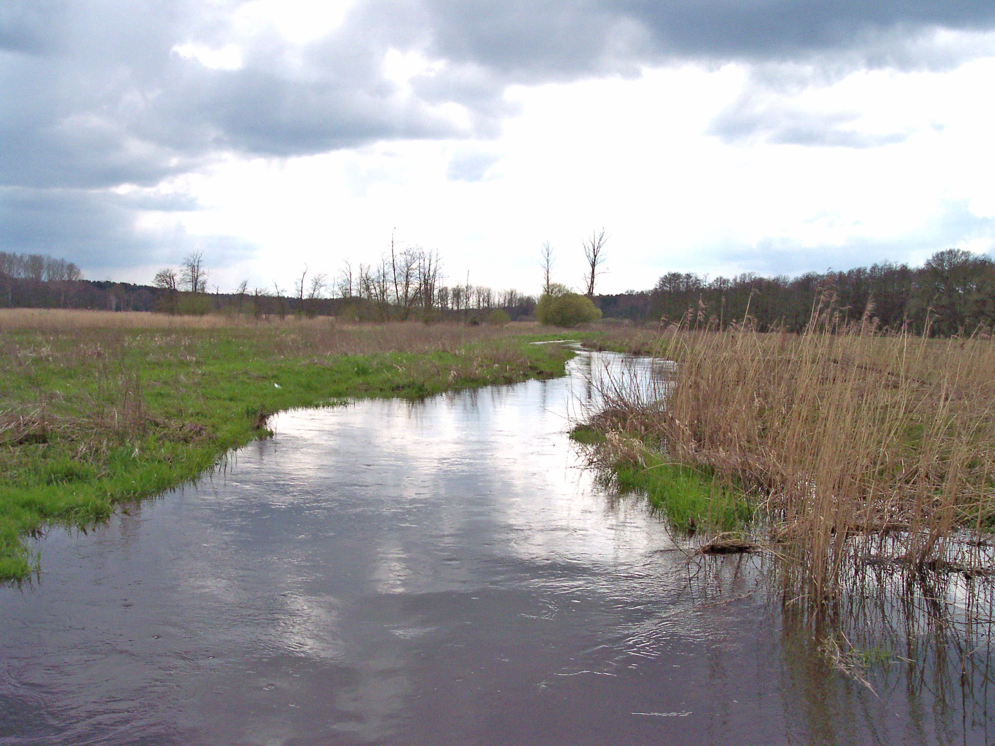 The river Aue Spring 2006 - Die Aue im Frühjahr 2006